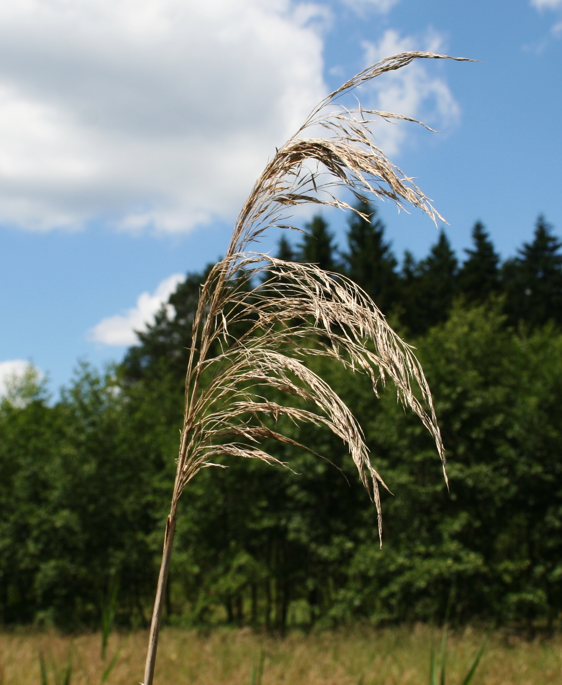 Trzcina pospolita w rezerwacie Miedzno (Wdecki Park Krajobrazowy). Występuje w zbiorowisku roślinnym: File:Miedzno strona N-E trzciny 01.07.10 p.jpg.